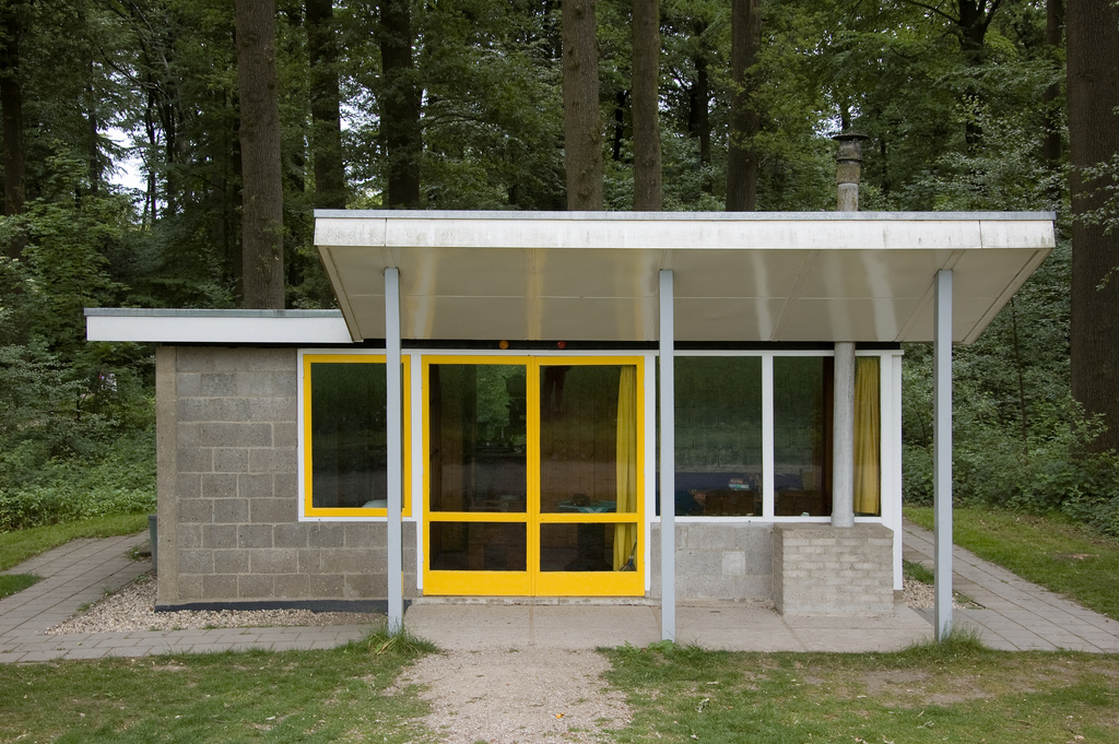 Vakantiehuisje Rietveld, Camping Hessenheem, Markelo, 1951, 15.10 Vakantiehuisje Rietveld, Camping Hessenheem, Markelo, 1951